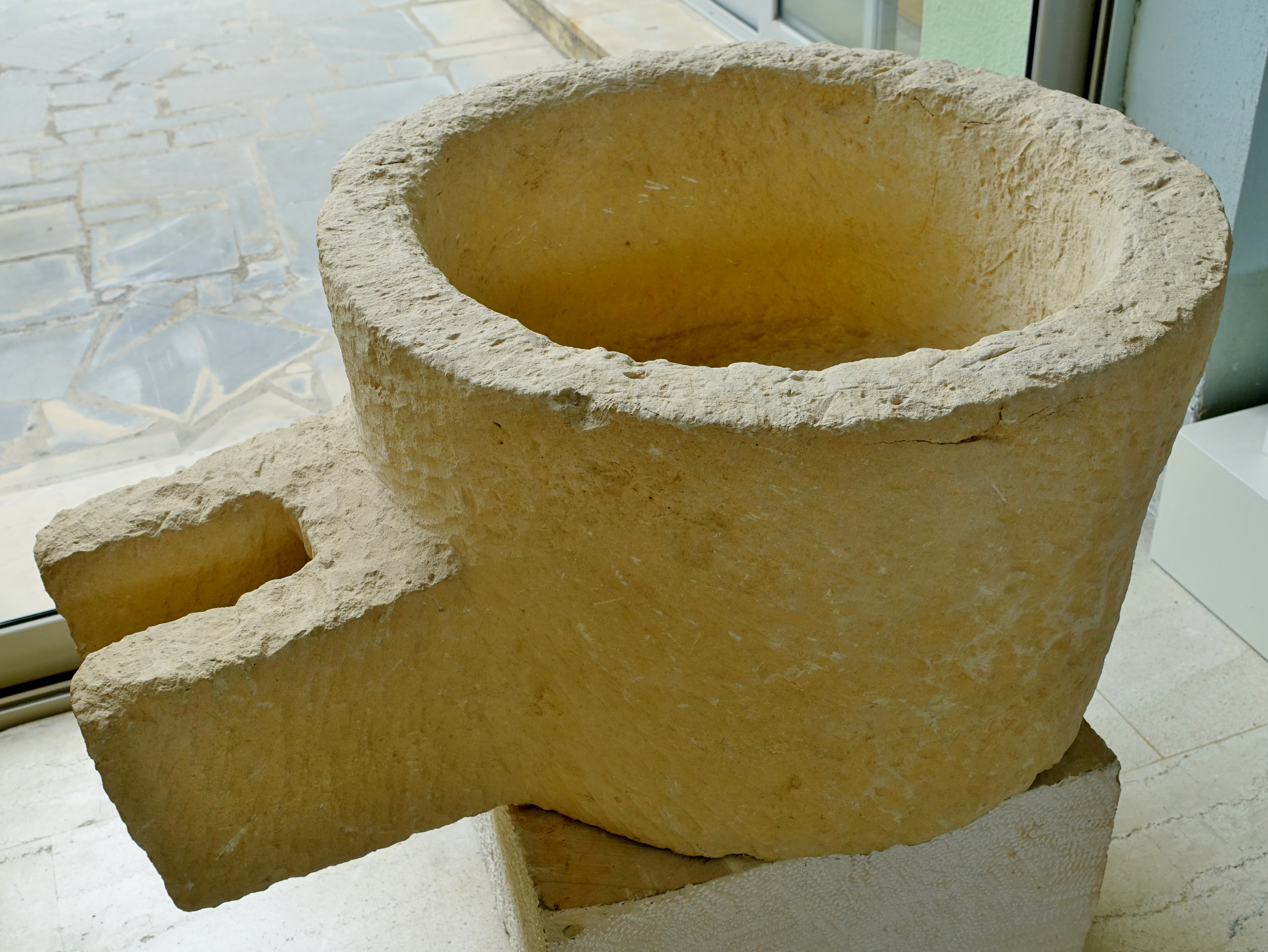 Neupalastzeitliche Weinpresse aus Petras, Archäologisches Museum von Sitia, Kreta, Griechenland